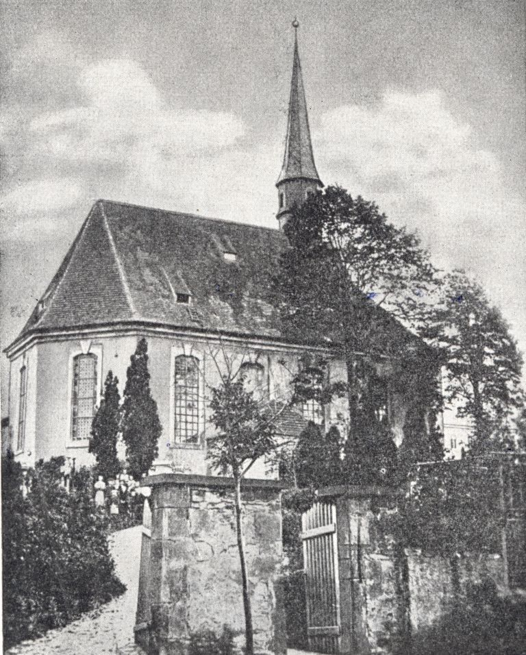 Foto der Plauener Kirche kurz vor ihrem Umbau 1893